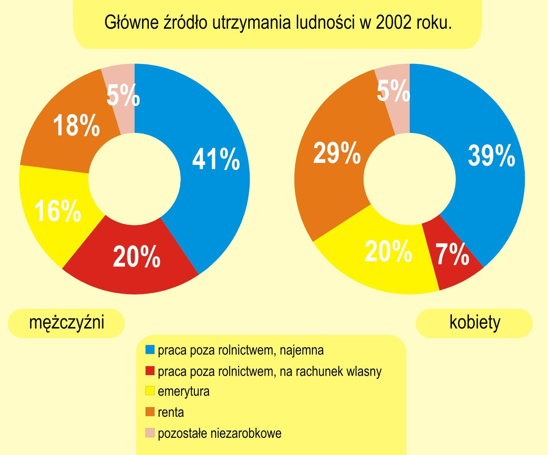 Główne źródło utrzymania swiatniki gorne